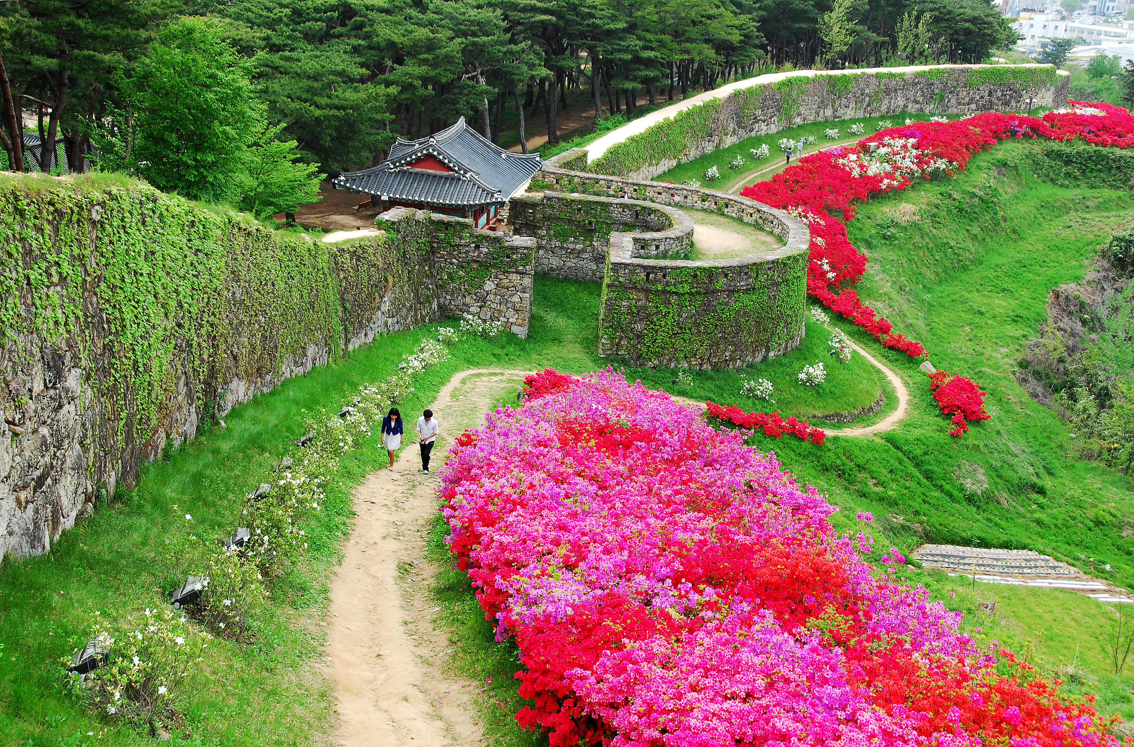 고창읍성의 화려하고 아름다운 봄을 표현함